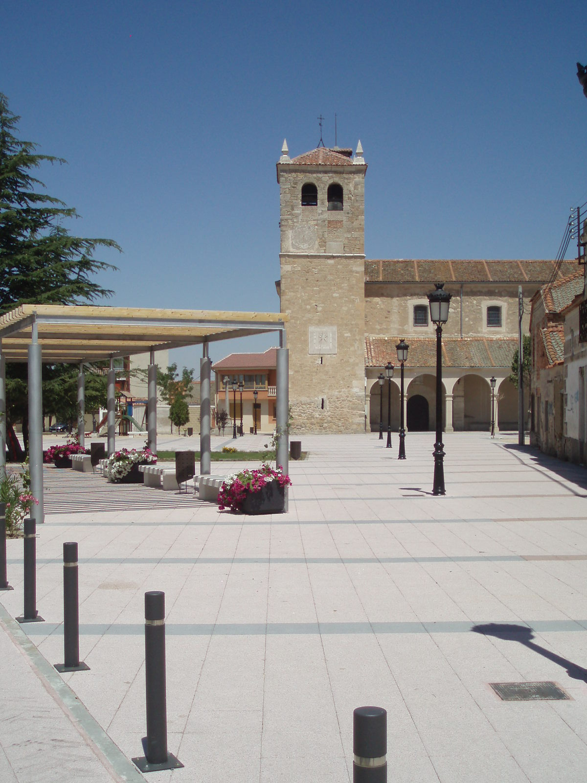 Iglesia de Abades (Segovia)